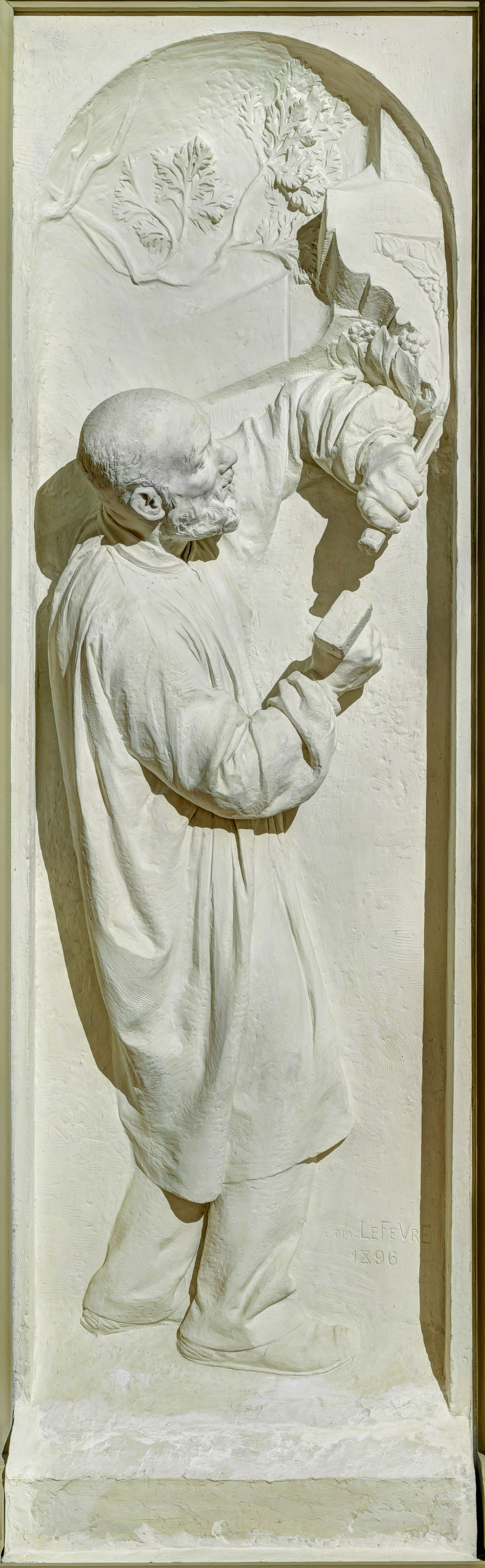 1896, épreuve en plâtre. Warning The original file has a large number of pixels and when opened at full resolution, may either not load properly or cause your browser to freeze. These problems can be avoided by use of the ZoomViewer. Open in ZoomViewer NOTE: This image is a panorama consisting of multiple frames that were merged or stitched in software. As a result, this image necessarily underwent some form of digital manipulation. These manipulations may include blending, blurring, cloning, and colour and perspective adjustments. As a result of these adjustments, the image content may be slightly different from reality at the points where multiple images were combined. This manipulation is often required due to lens, perspective, and parallax distortions. Musée des Beaux-Arts de Belfort : Le sculpteur (panorama HDR). Camille LEFÈVRE (Issy-les-Moulineaux, 1853 - Paris, 1933). 1896, épreuve en plâtre. Coll. Musées de Belfort, n° inv. CLS 101.